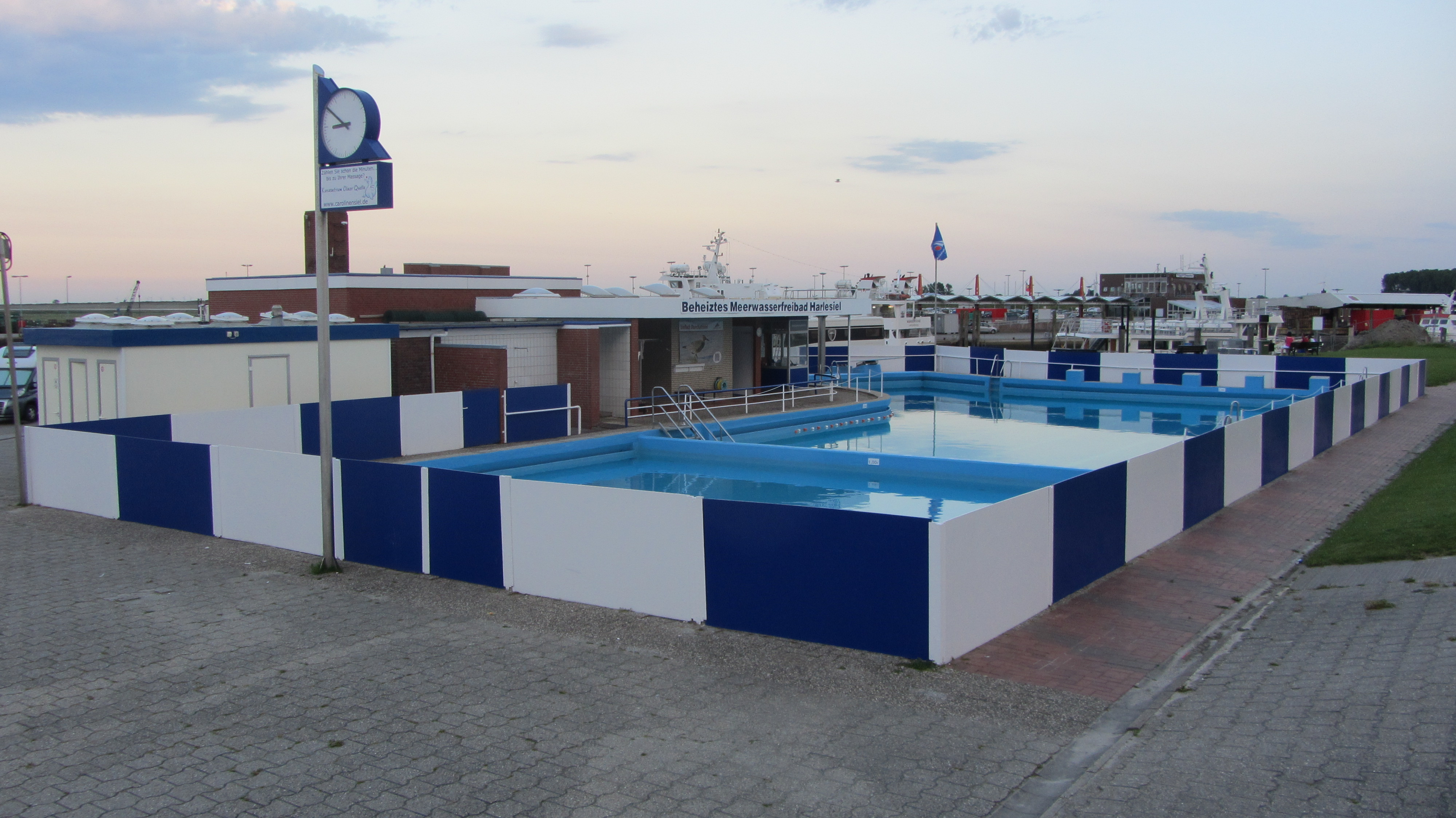 Das beheizte Meerwasserschwimmbad in Harlesiel